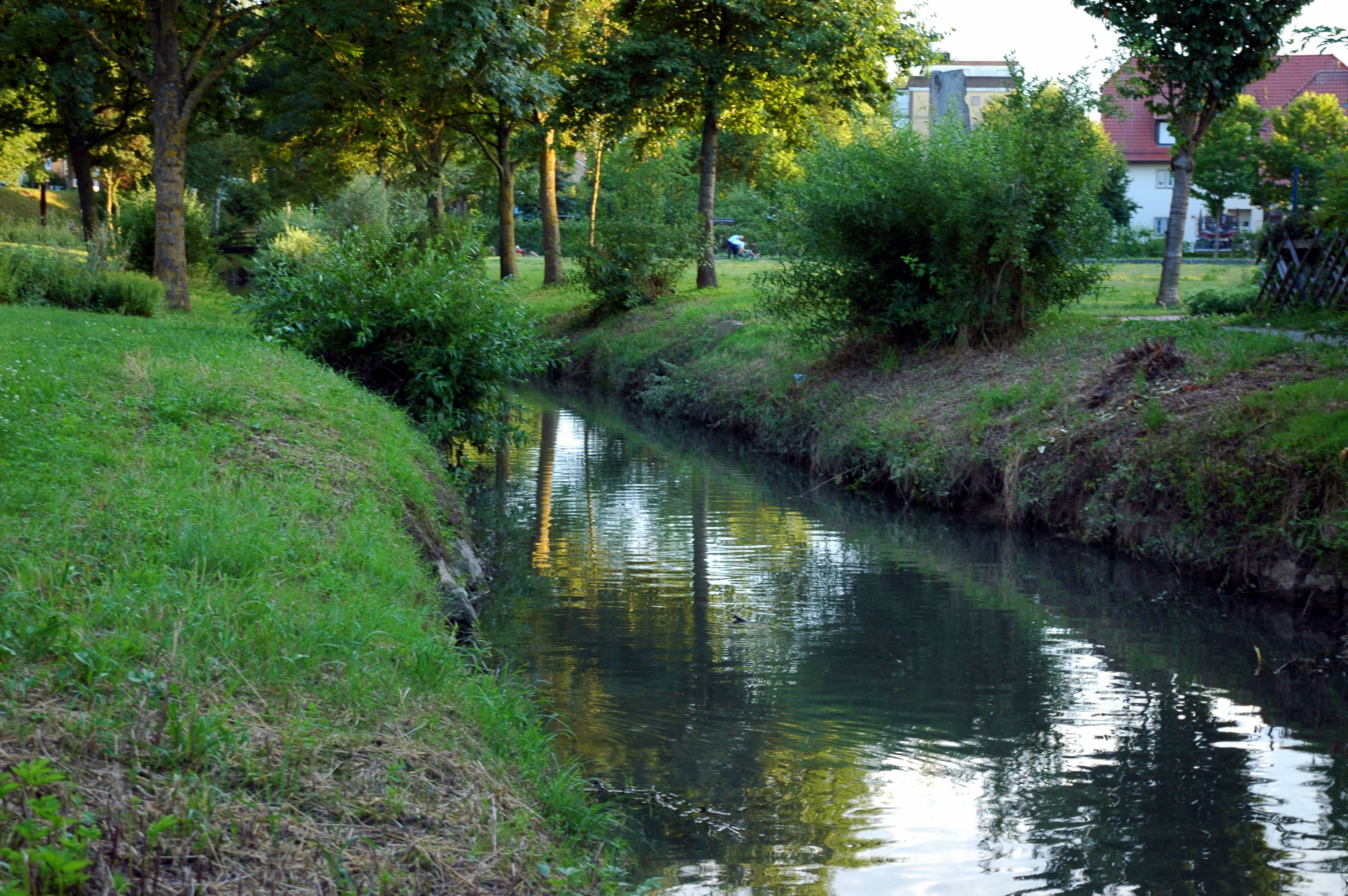 Fluss Elsenz